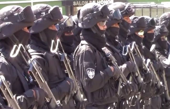 Policia Boliviana antiterrorista en diciembre de 2019